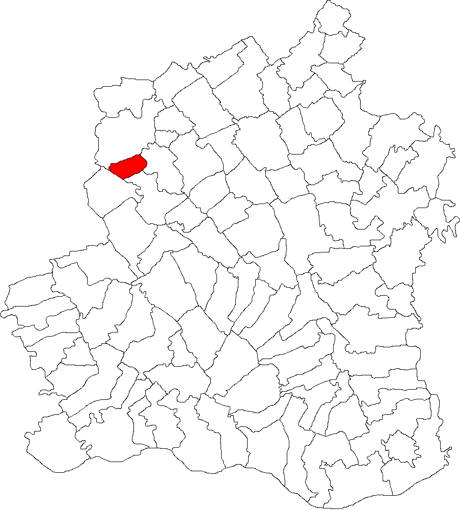 Categorie:Hărţi ale judeţului Teleorman